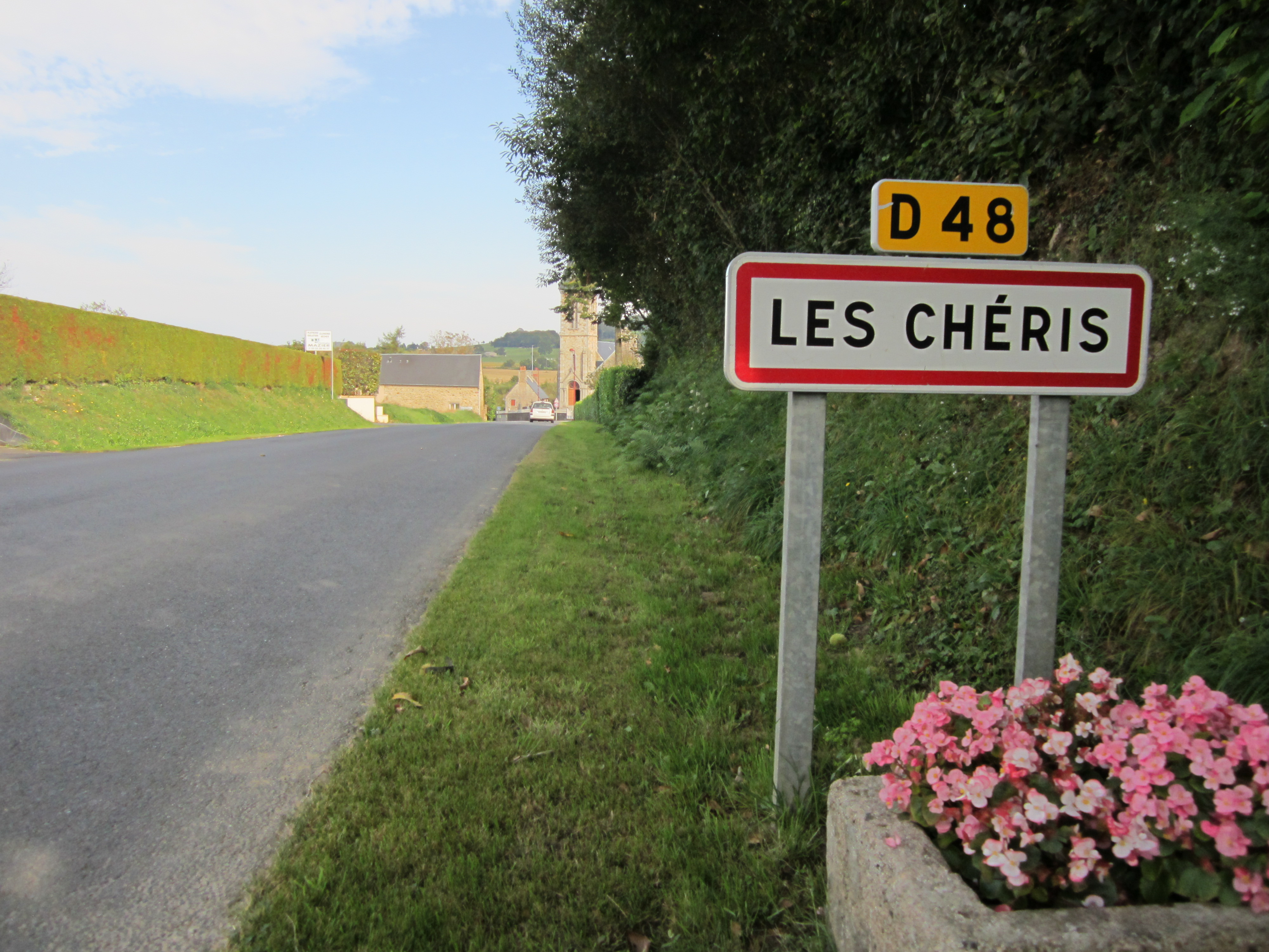 Les Chéris, Manche